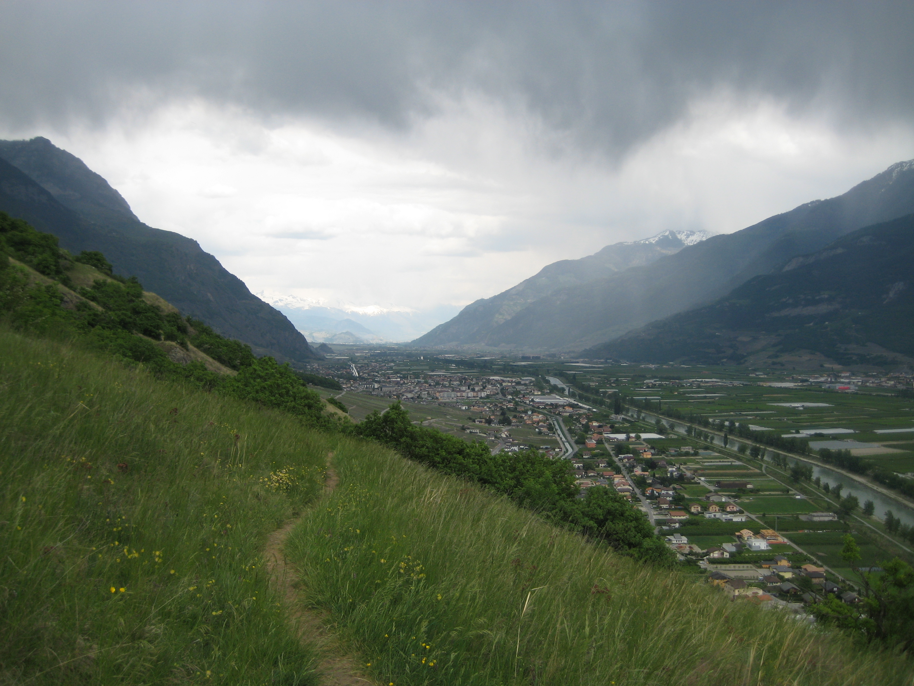 Commune de Fully vue depuis les Follatères (Valais, Suisse)